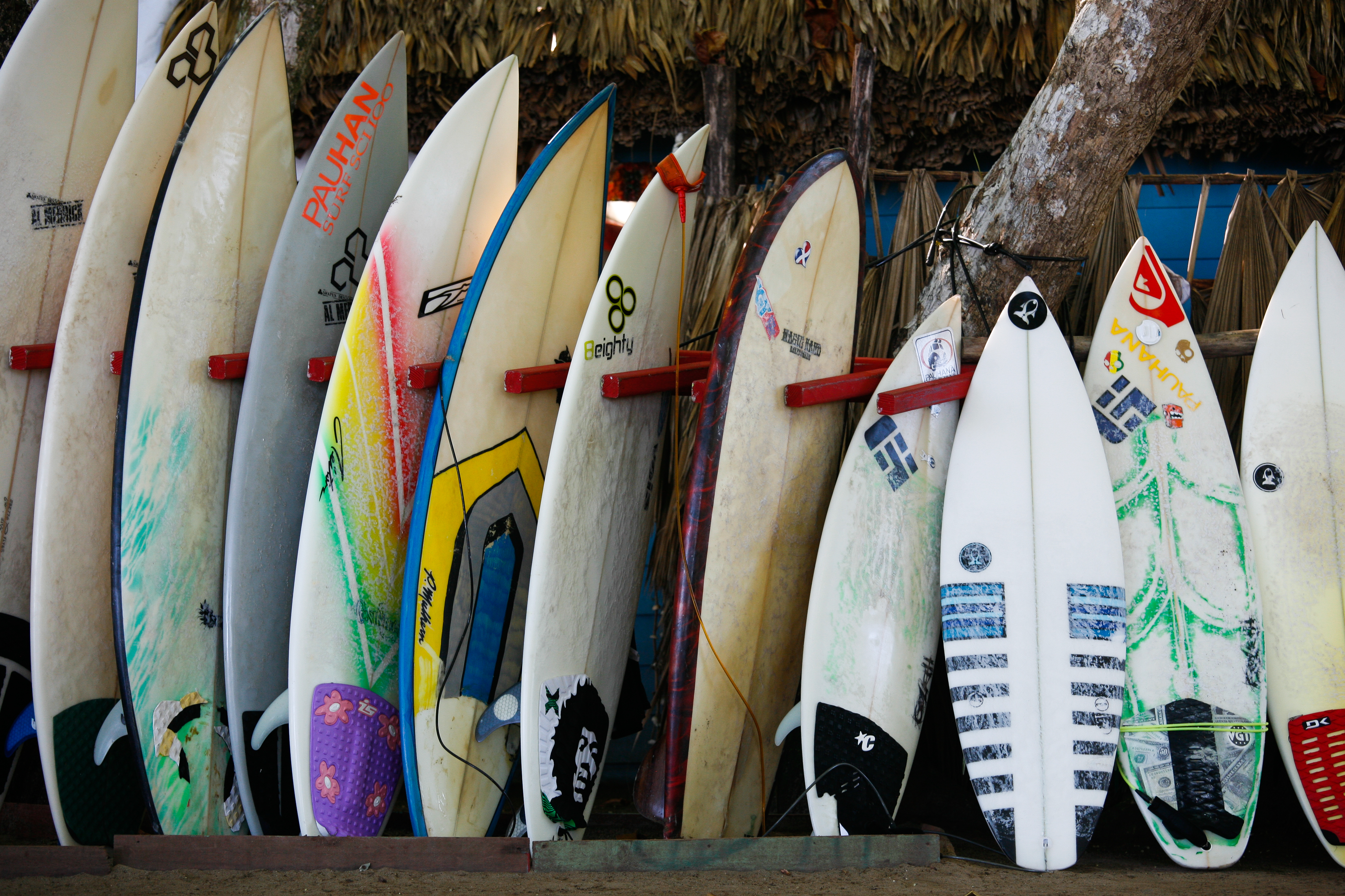 Dominican Republic